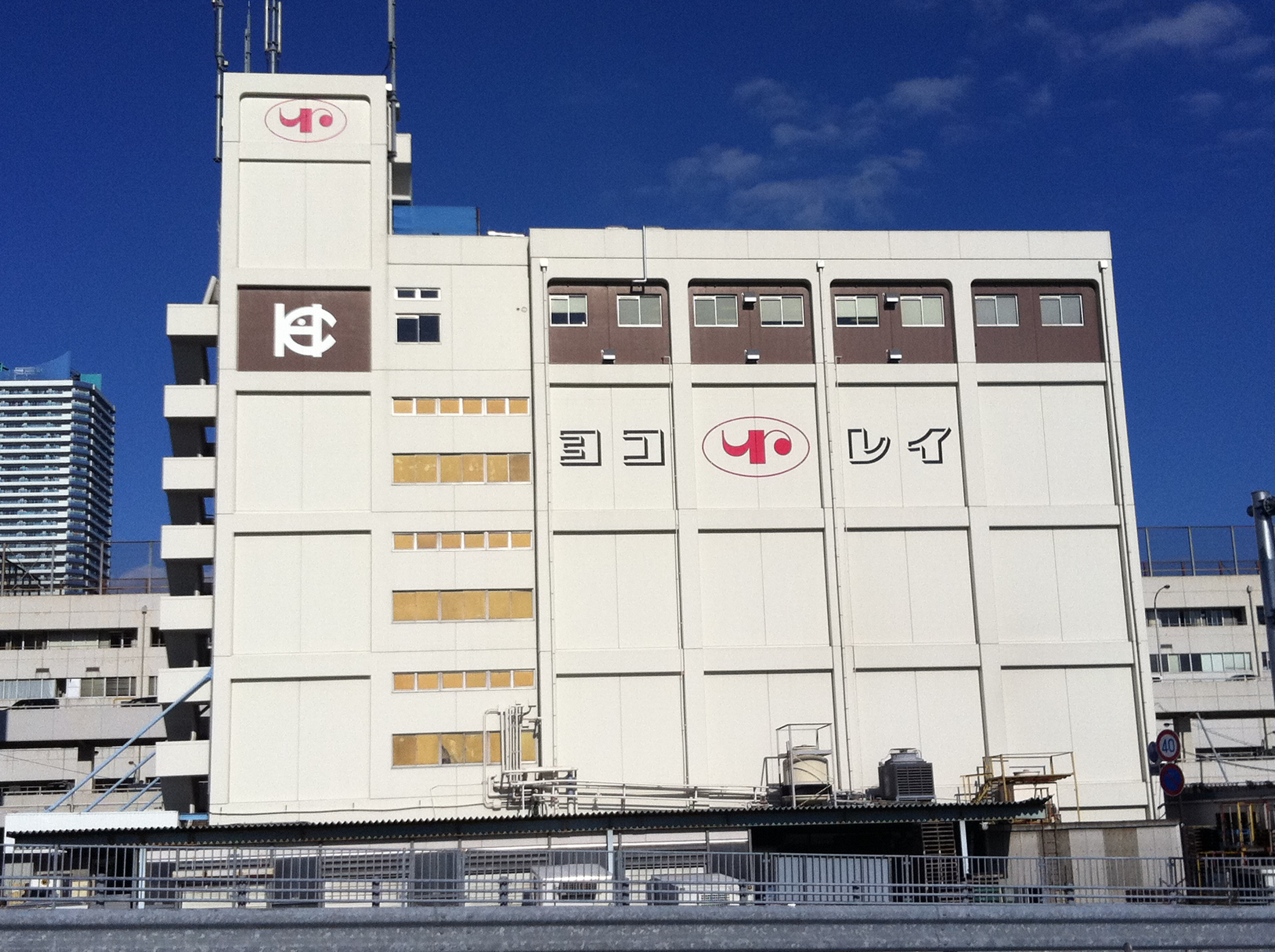 横浜市中央卸売市場本場、冷蔵庫棟「ヨコレイ」。